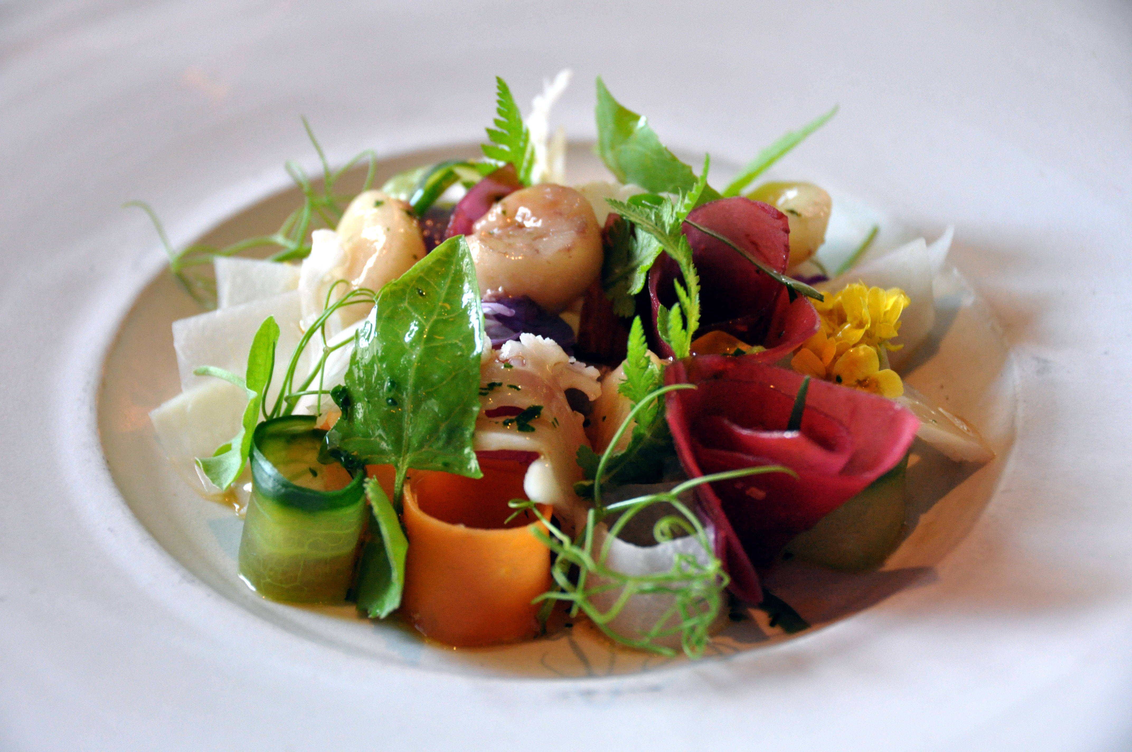 Marv med syltede grøntsager